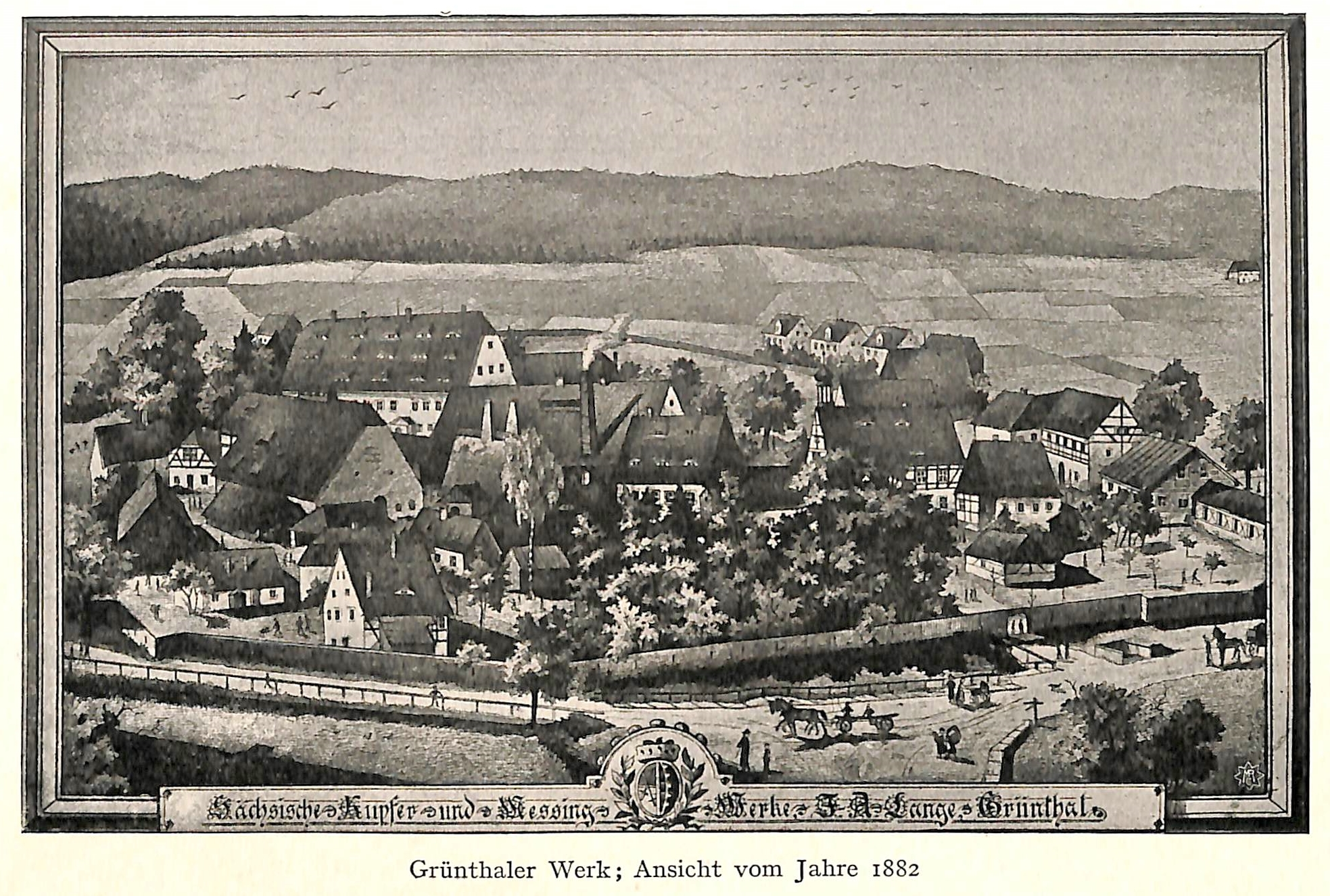 Ansicht der Saigerhütte im Jahre 1882.